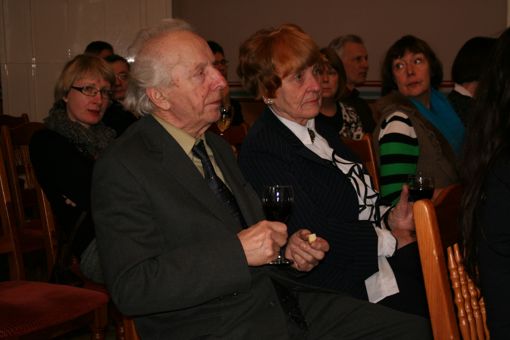 Jaan Rannap, Olivia Saar ja Maimu Berg. Tagapool Marin Laak ja Eeva Park. Kirjanike Liidu üldkogu Tartus 23. märtsil 2012.